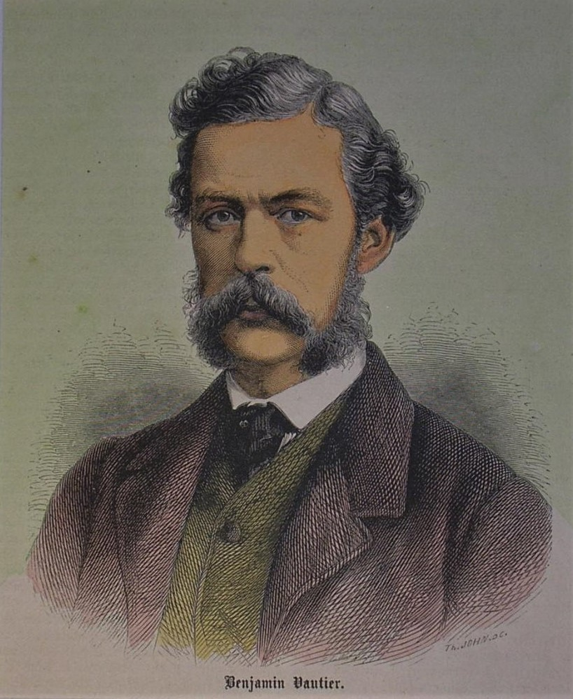 Benjamin Vautier 1873, teilkolorierter Holzstich, ca. 14 x 12 cm